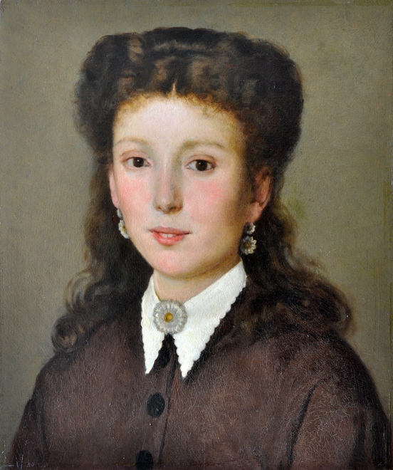 Ritratto a Maria Virginia Fabroni di Silvestro Lega